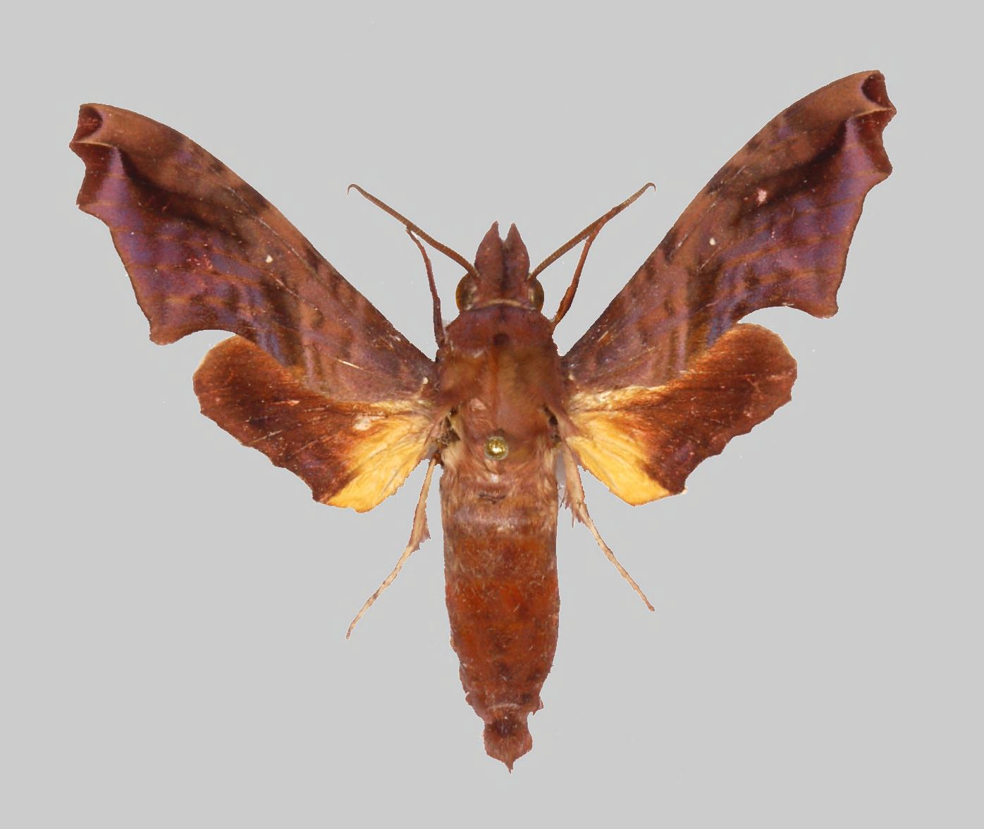 Pseudenyo benitensis, male, upperside. Cameroon, Buea, Upper Farms